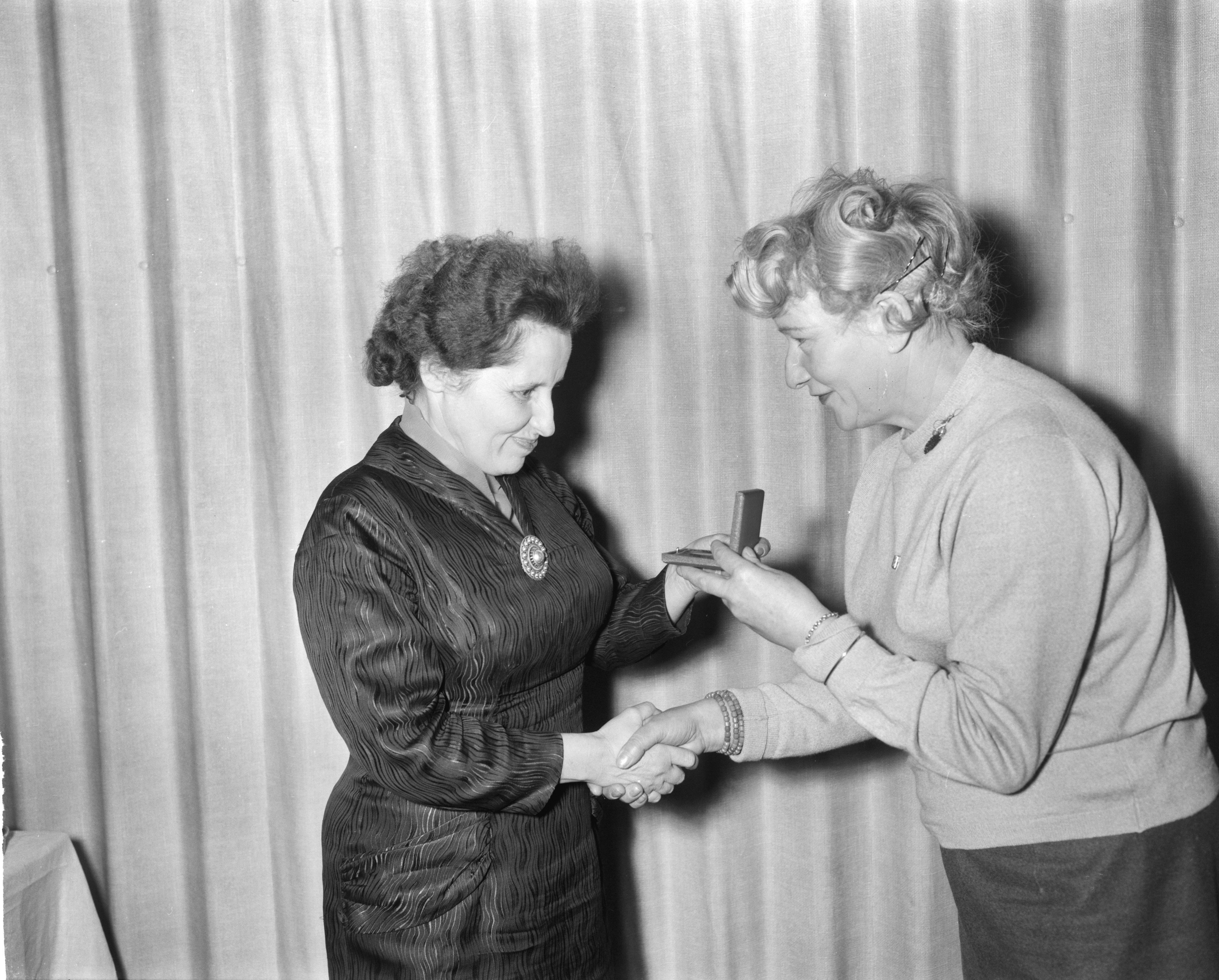 Collectie / Archief : Fotocollectie Anefo Reportage / Serie : [ onbekend ] Beschrijving : Wereldkampioenschap schaken Bykowa wint Danlonschaaktourn Datum : 3 november 1960 Trefwoorden : schakers, wereldkampioenschappen Persoonsnaam : Bykowa Fotograaf : Bilsen, Joop van / Anefo Auteursrechthebbende : Nationaal Archief Materiaalsoort : Negatief (zwart/wit) Nummer archiefinventaris : bekijk toegang 2.24.01.04 Bestanddeelnummer : 911-7358